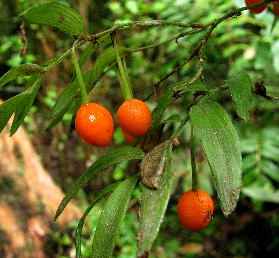 Luzuriaga radicans - fruits